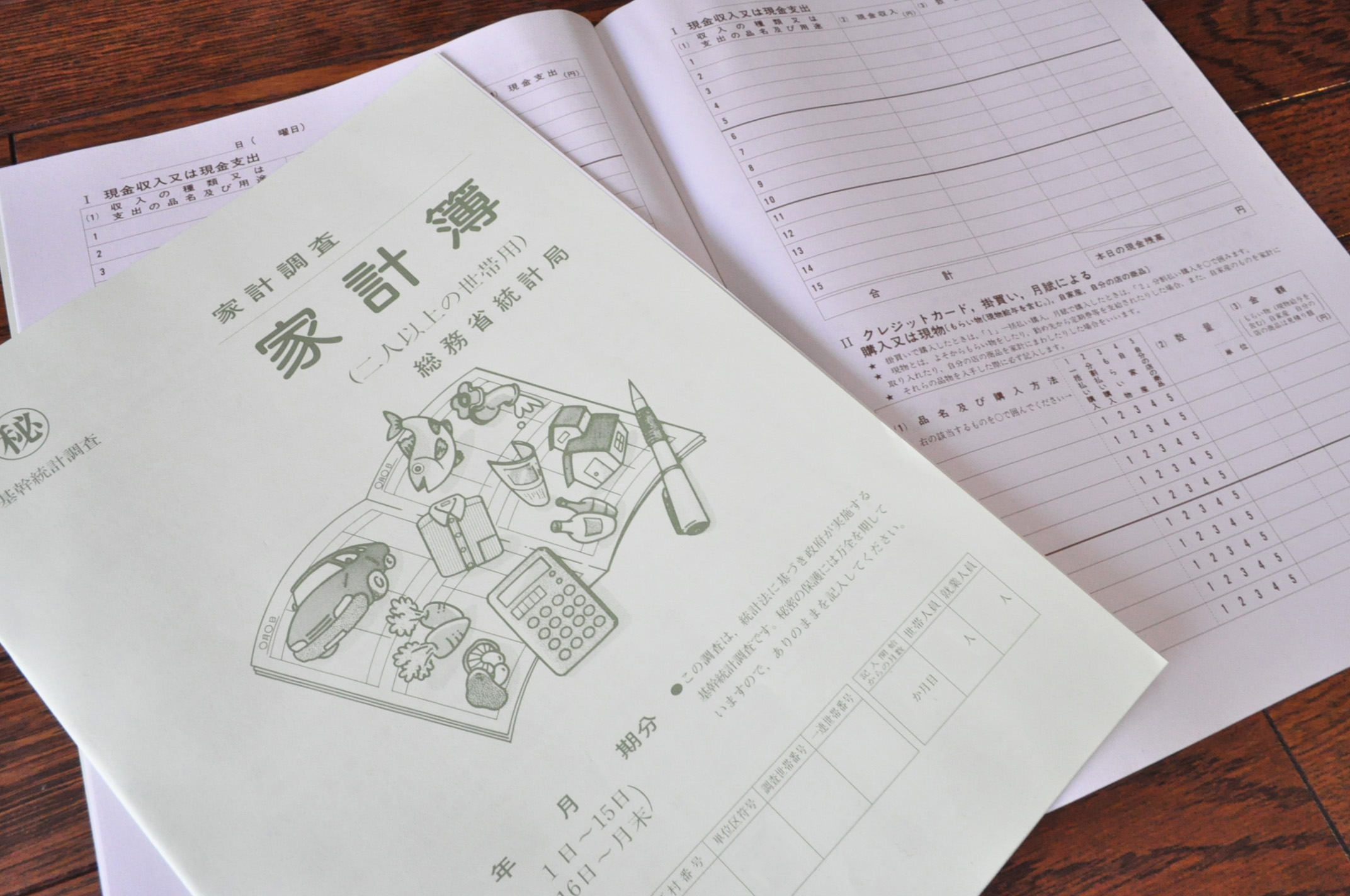 総務省が実施する家計調査用の家計簿。対象世帯に配布され、回収される。